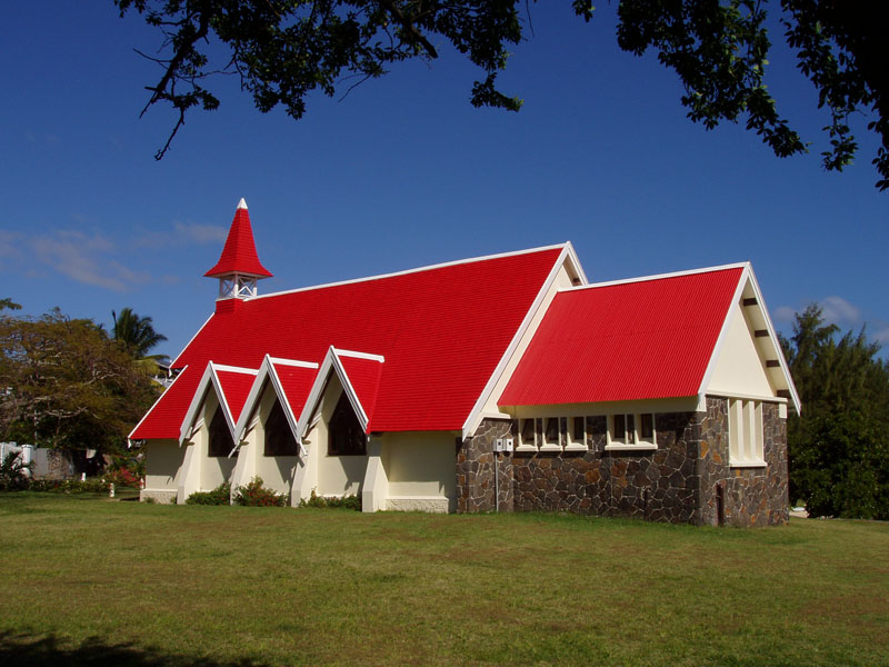 Die Kapelle Notre Dame Auxiliatrice am Cap Malheureux - Mauritius